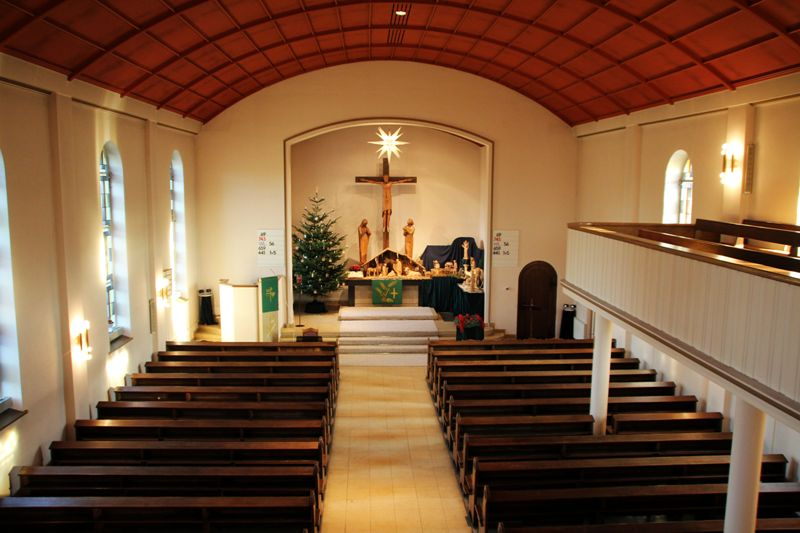 Evangelische Kreuzkirche in Wiedenbrück, Innenraum mit Kreuzigungsgruppe von Bernd Hartmann